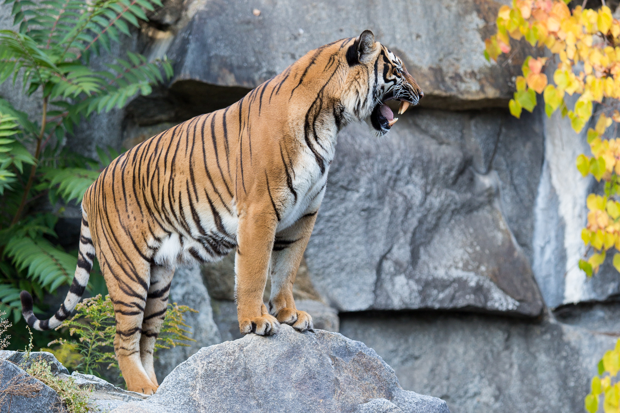 Hinterindischer (Indochina-)Tiger im Tierpark, Berlin.